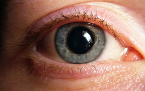 Auge eines männlichen 23-Jährigen (Blau)